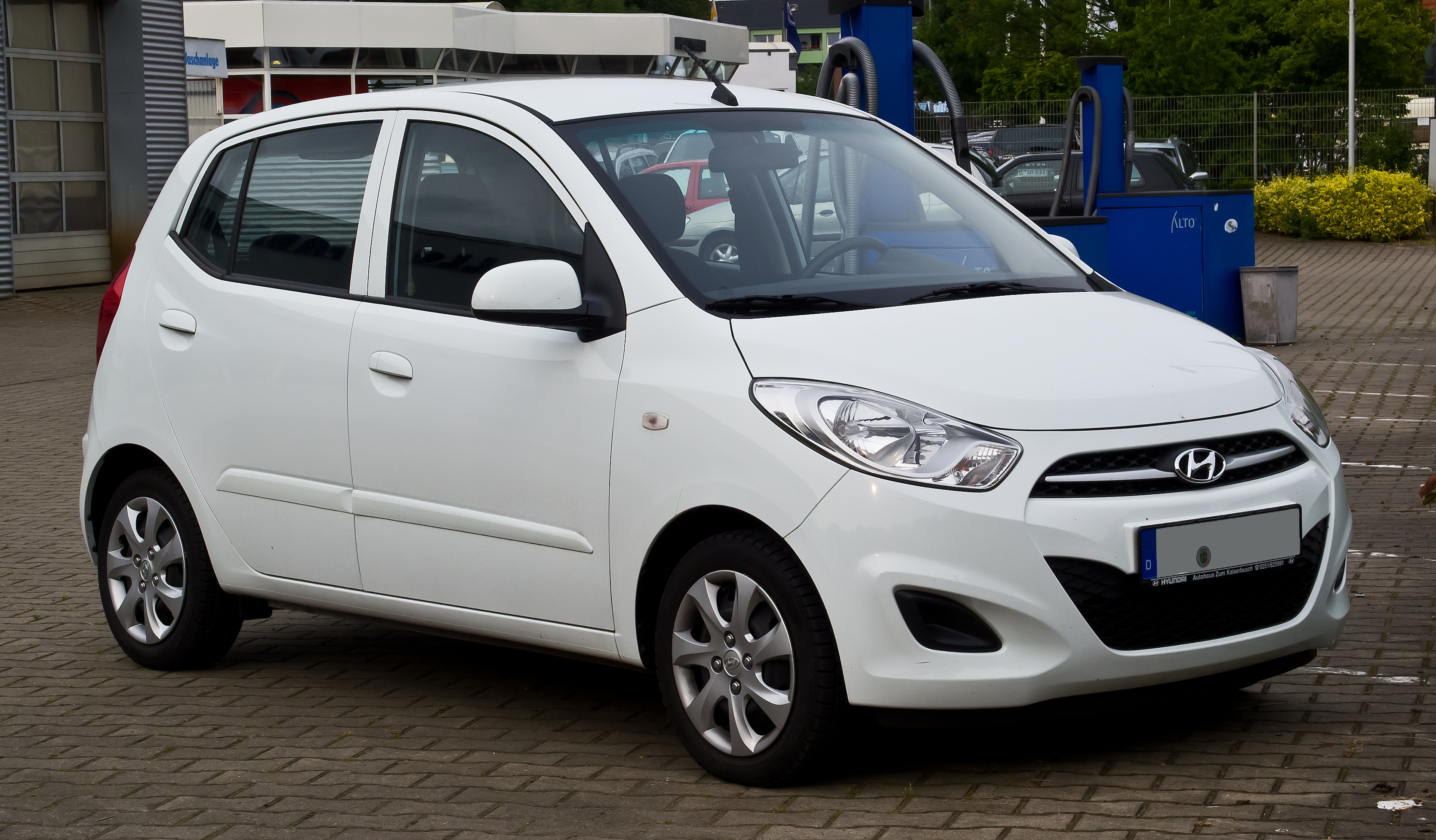 Hyundai i10 1.2 Style (Facelift)